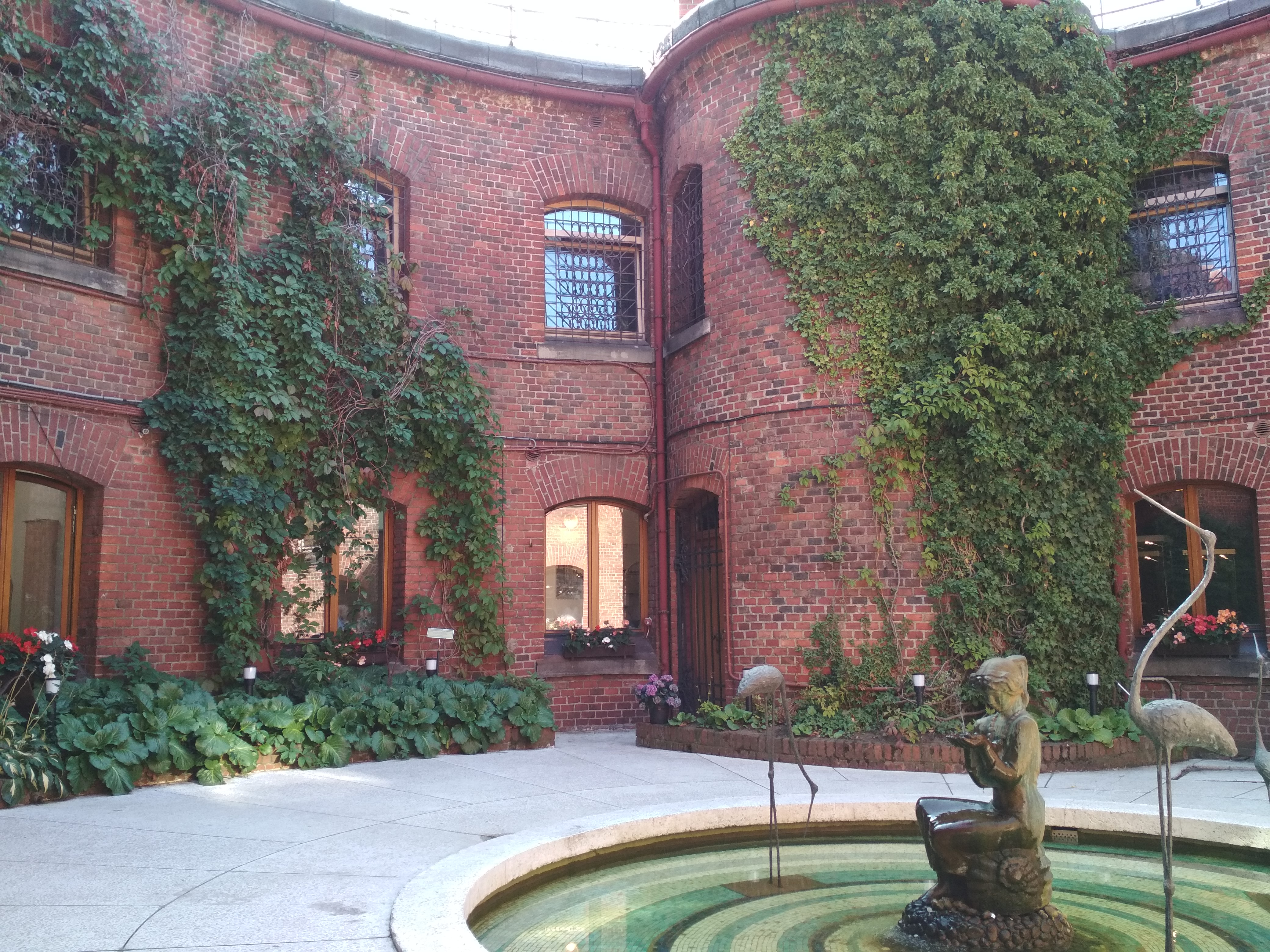 Автор я, Ильмира Контини (Франция)